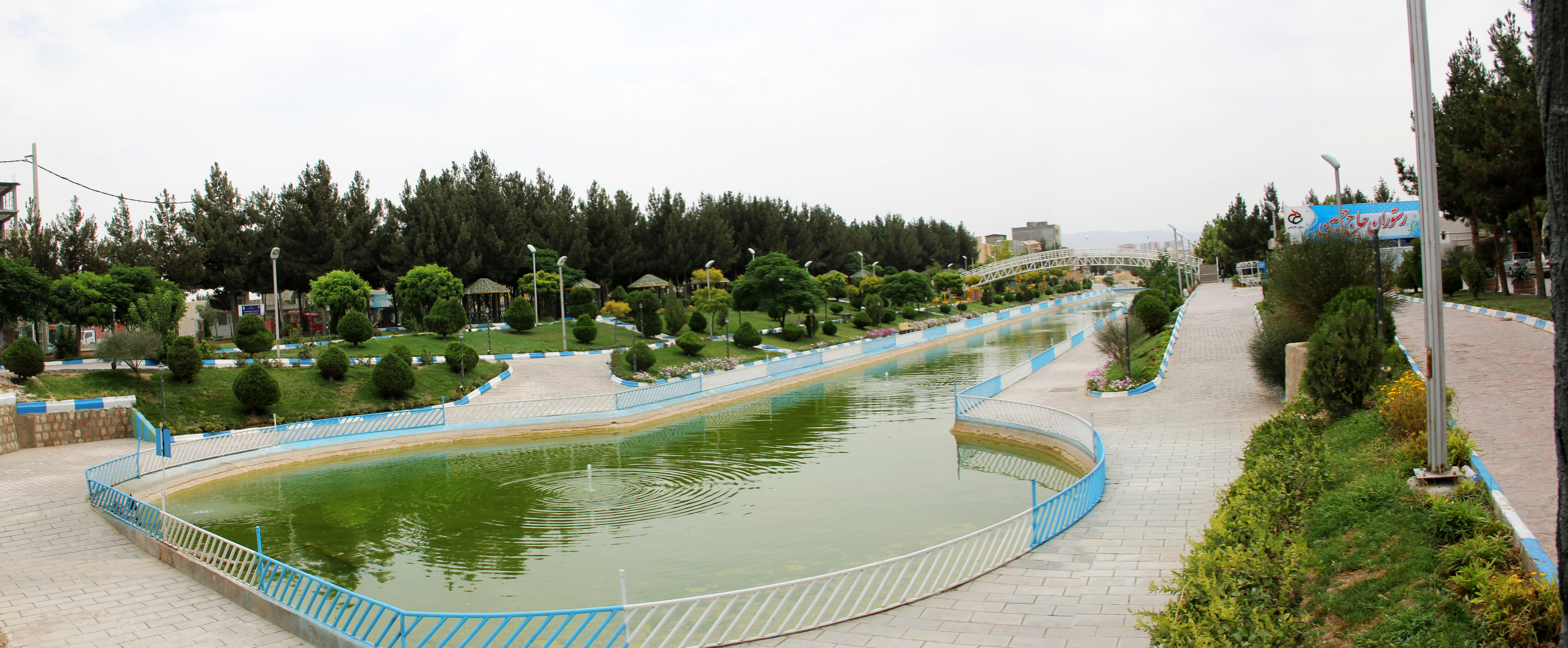 پارک آفرینش بجنورد